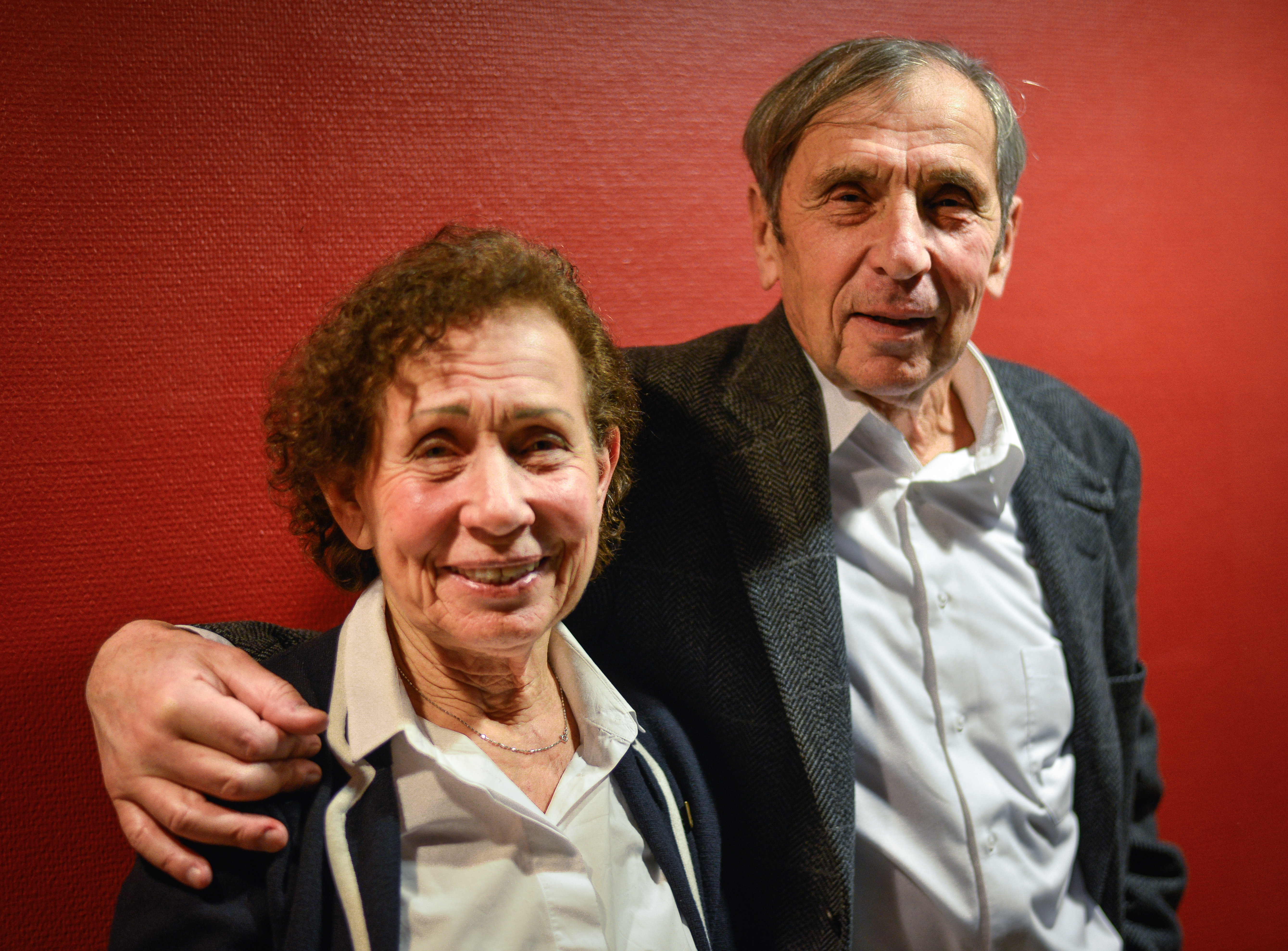 Der schweidsche Arzt Jovan Rajs und seine Ehefrau, der Architektin Dina Rajs, am 5. Februar 2015.